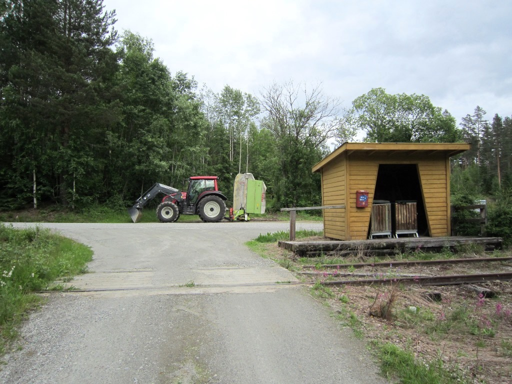 Bjorsåte holdeplass på Numedalsbanen